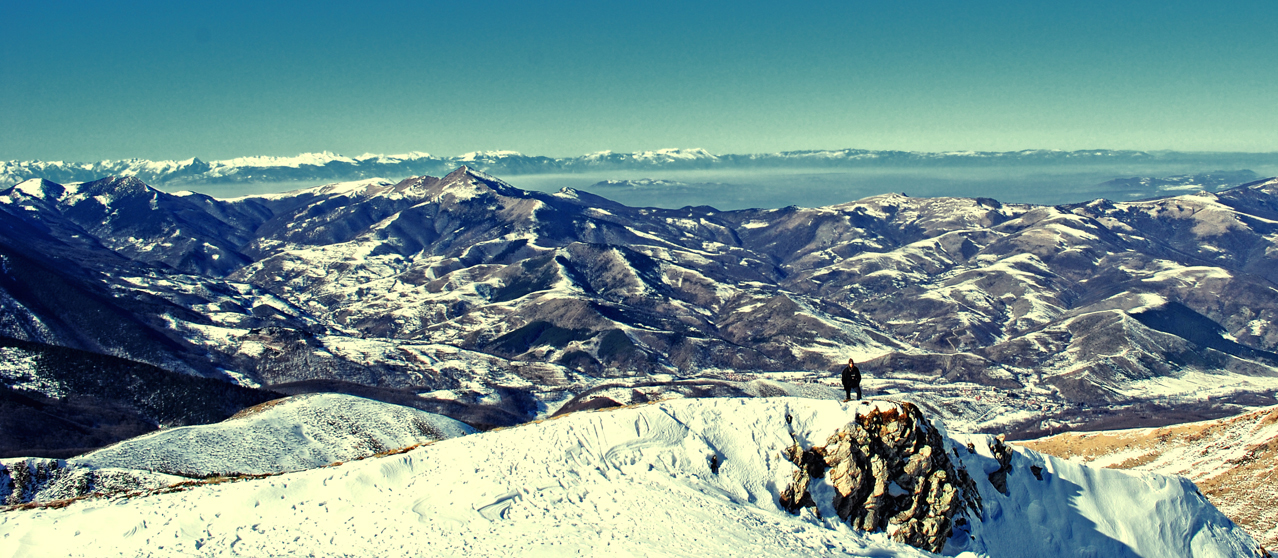 Bamanankan: Ski resort in Kosovo Brezovica